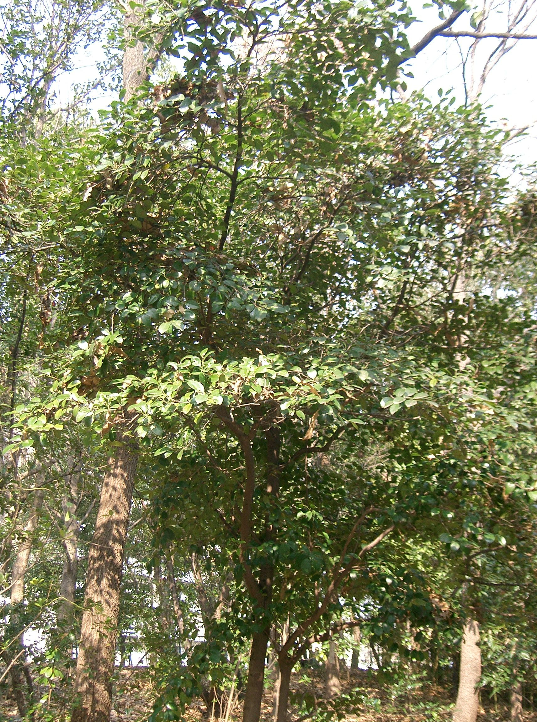 Distylium racemosum